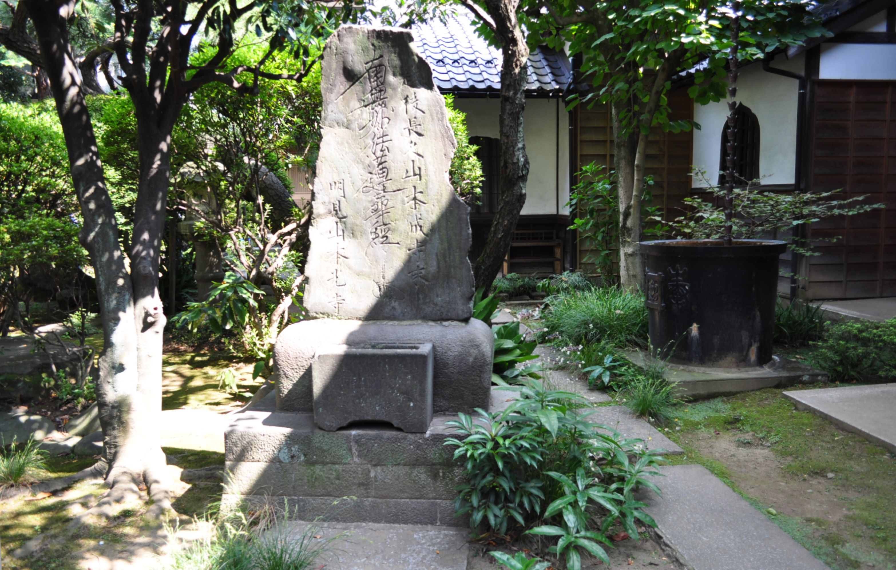 本堂の左横の石碑（1014年9月23日）。